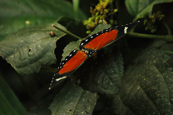 Uganda Kanyo Pabidi Res, Masindi, Uganda